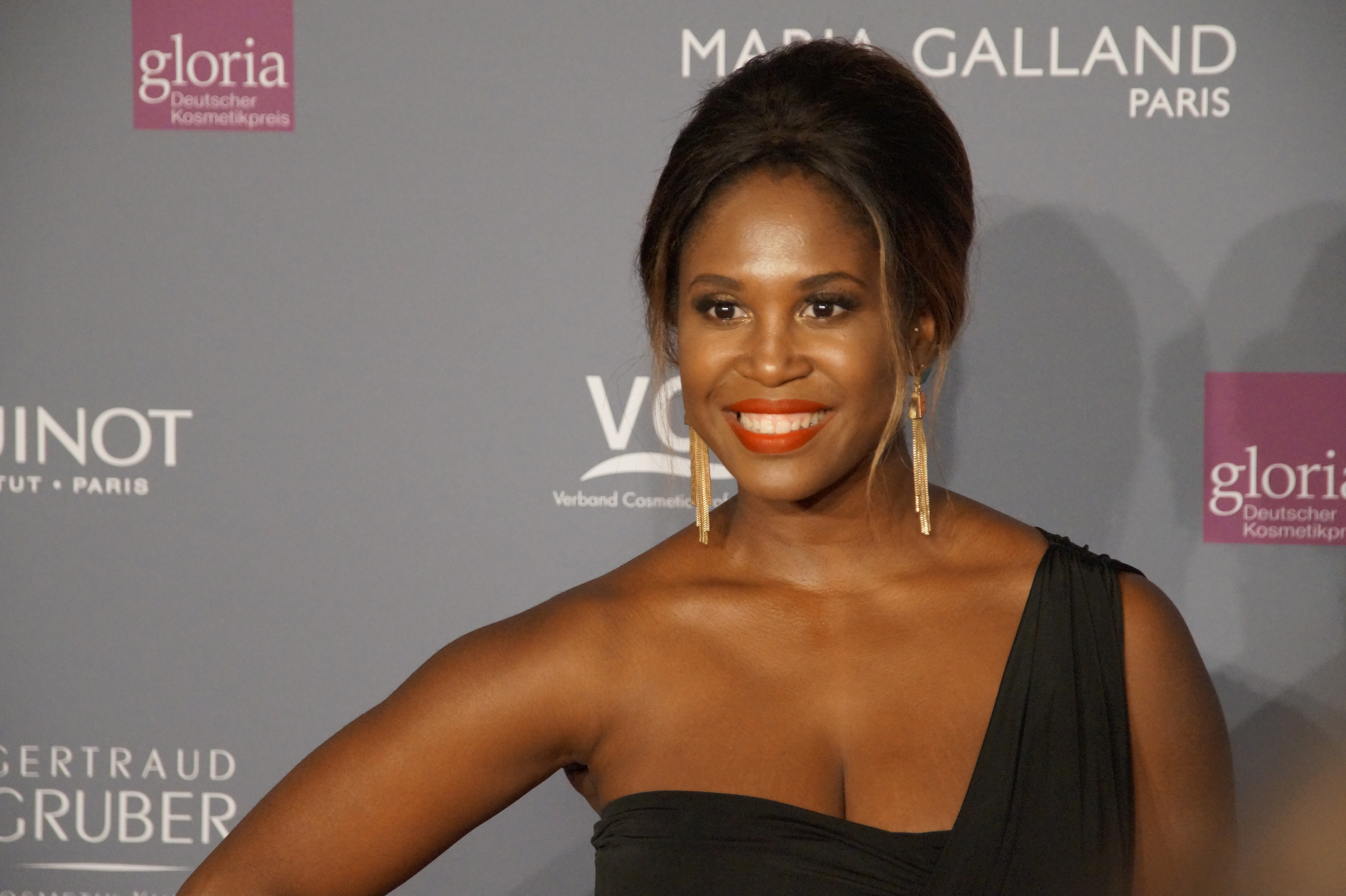 Motsi Mabuse beim "Gloria – Deutscher Kosmetikpreis" am 04. März 2016 im Hilton Hotel Düsseldorf.